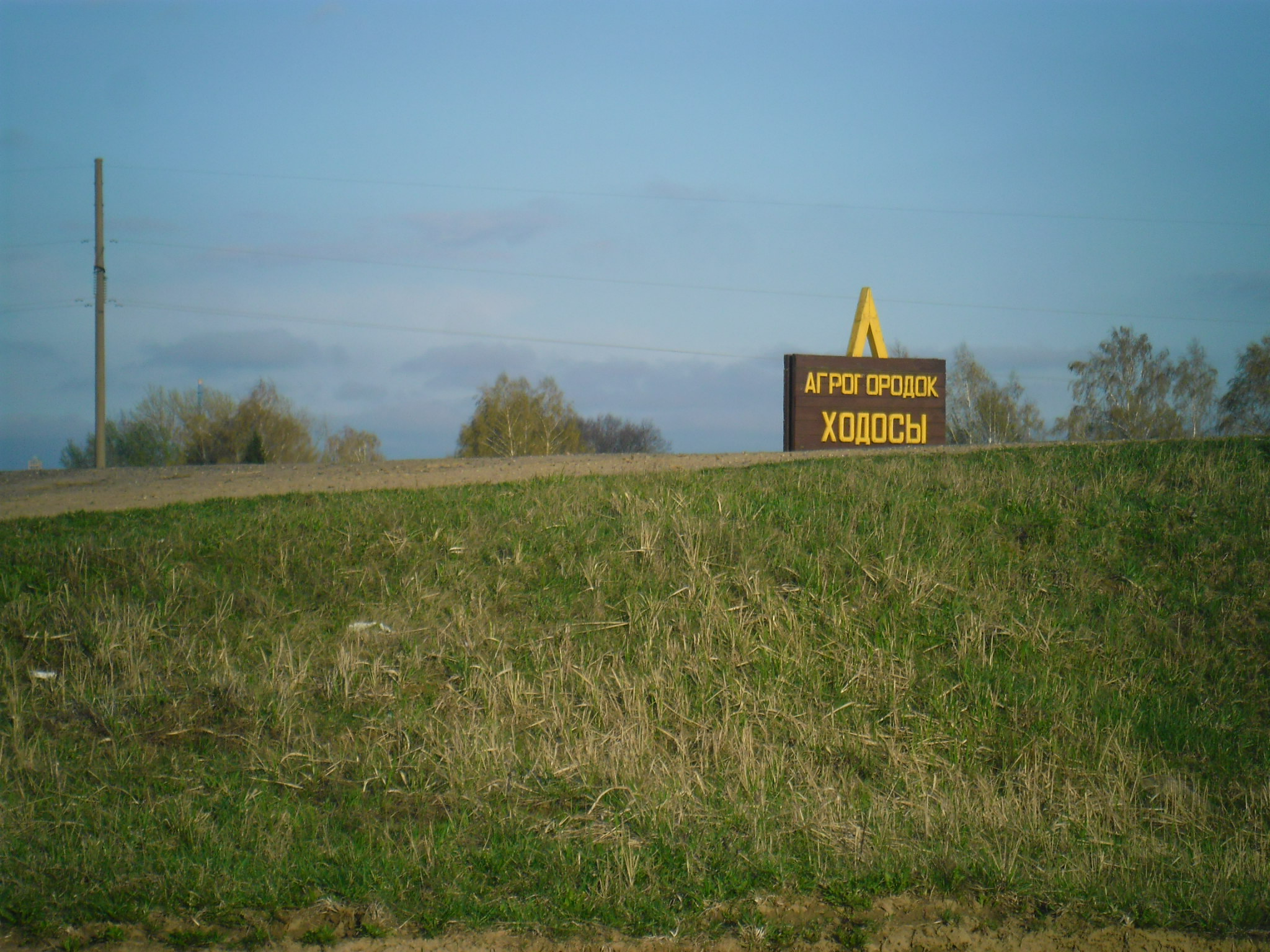 Начало деревни